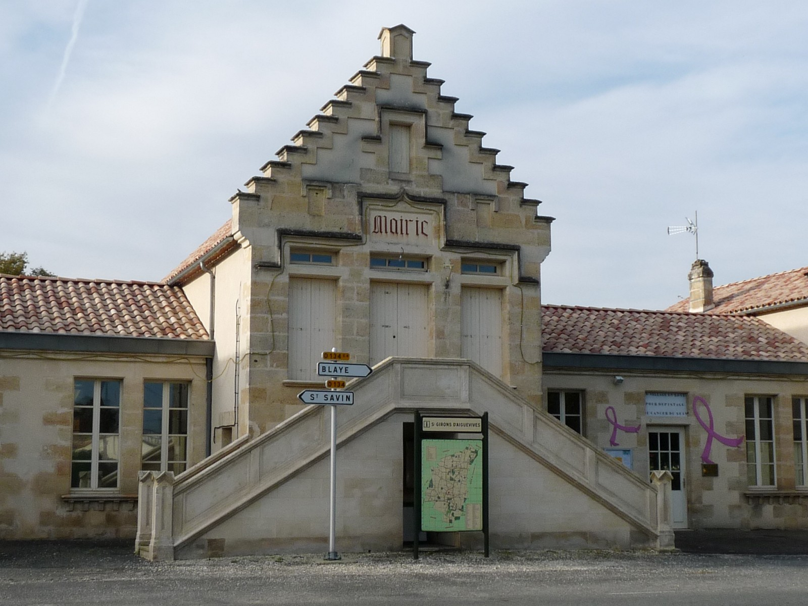 Mairie de Saint-Girons-d'Aiguevives, Gironde, France